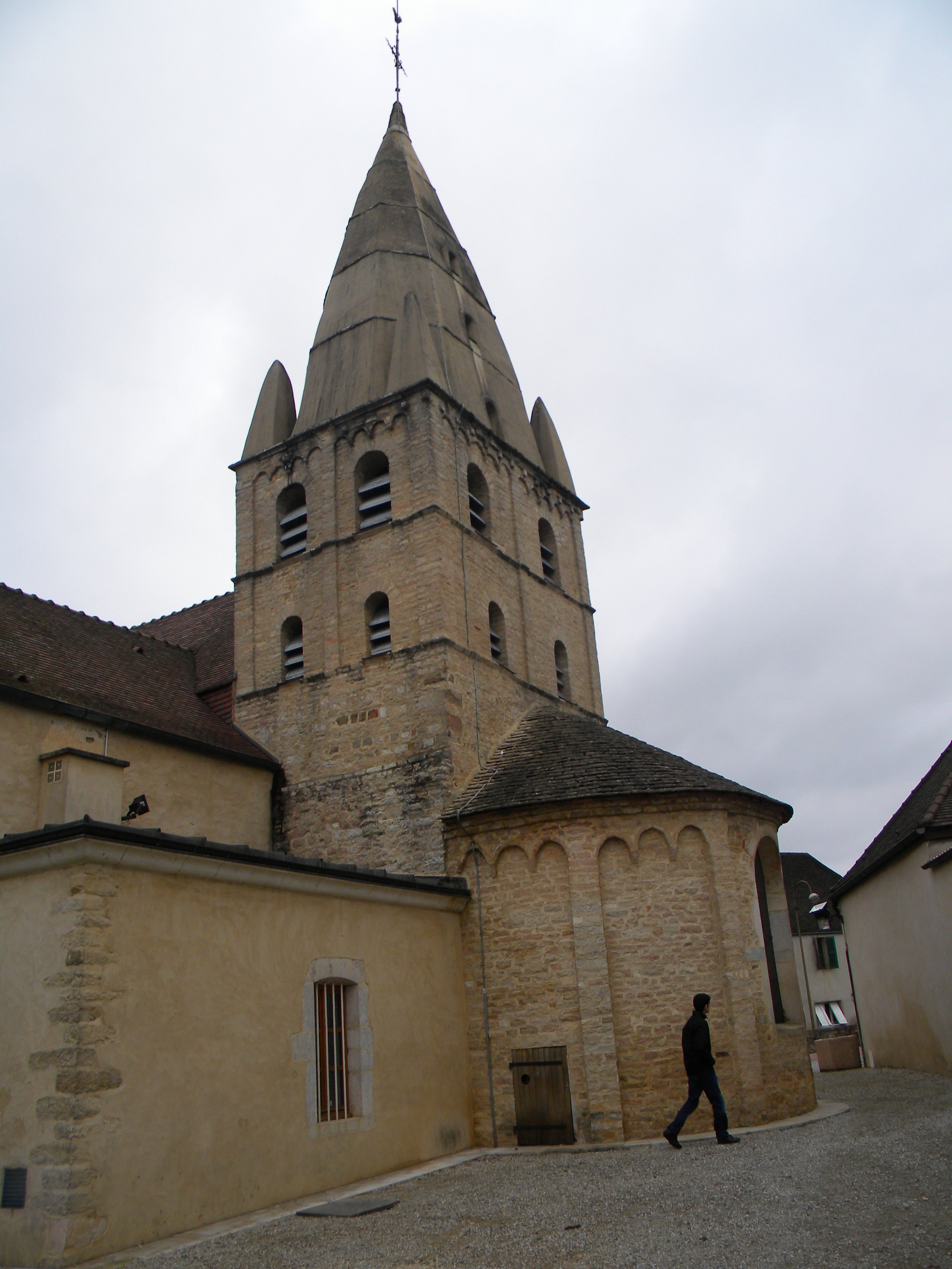 Kirko de Bligny-lès-Beaune